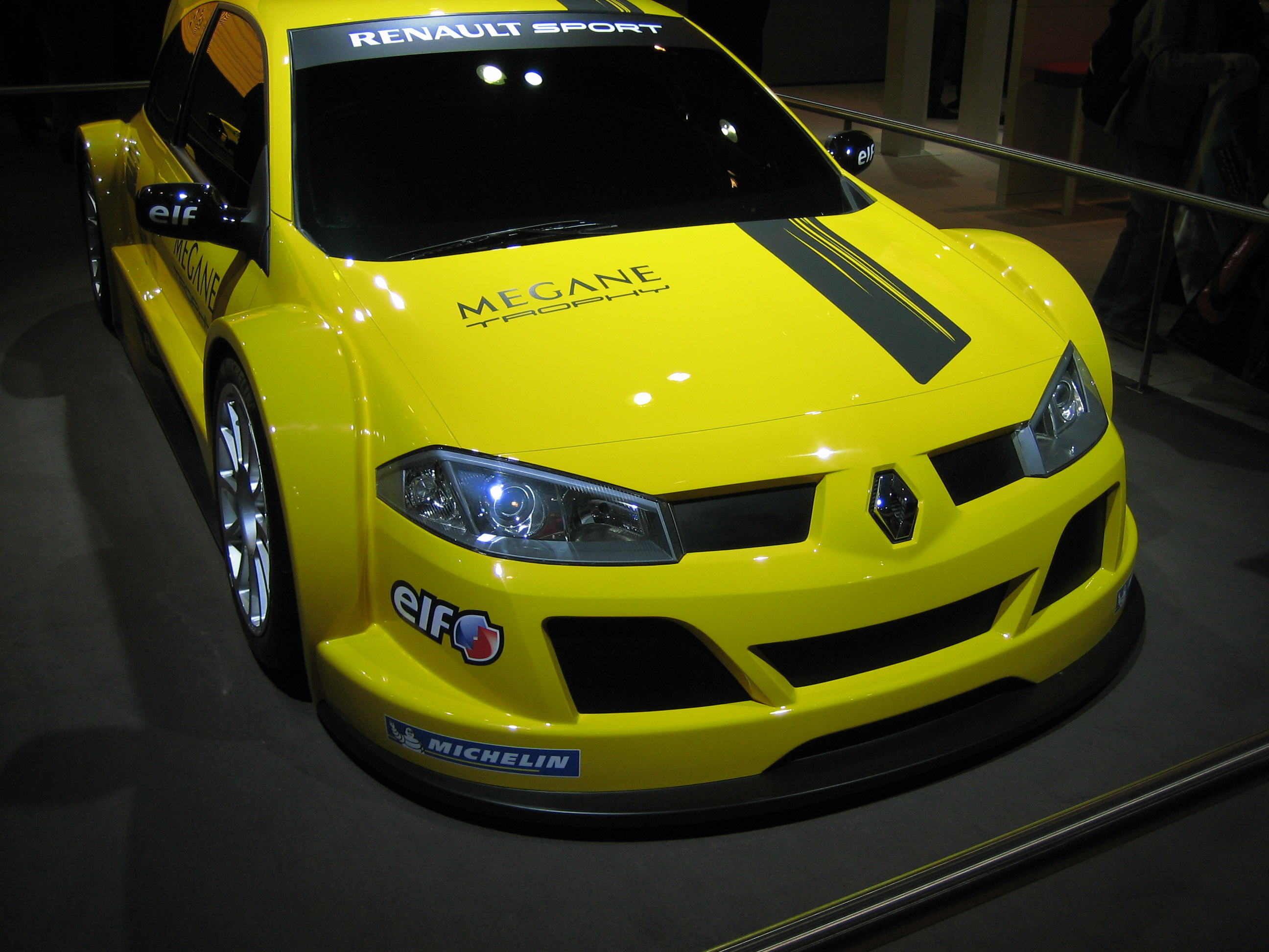 Renault Mégane Trophy (Brussel 2006). Eigen werk, PD.